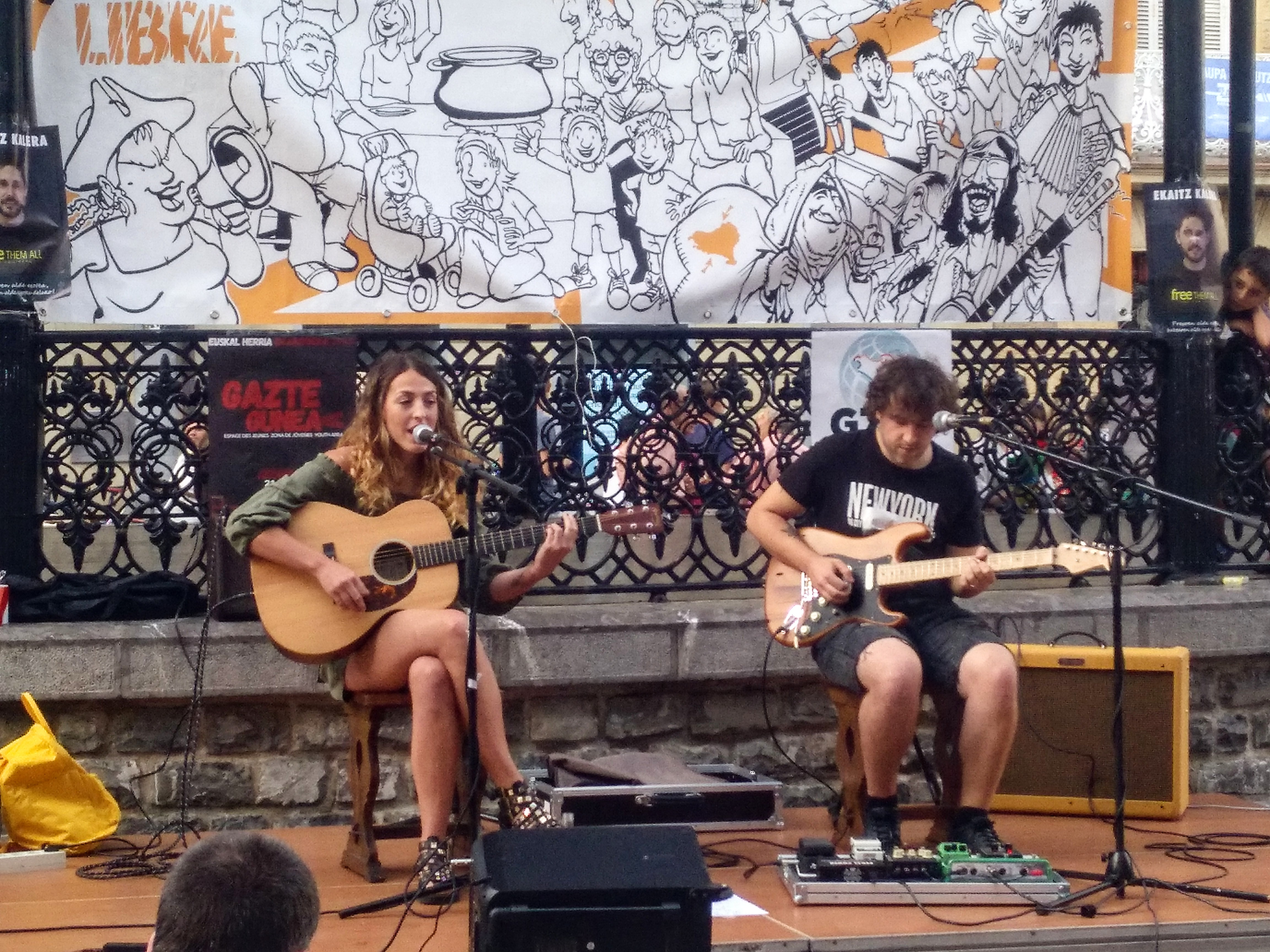 Natali musika taldea